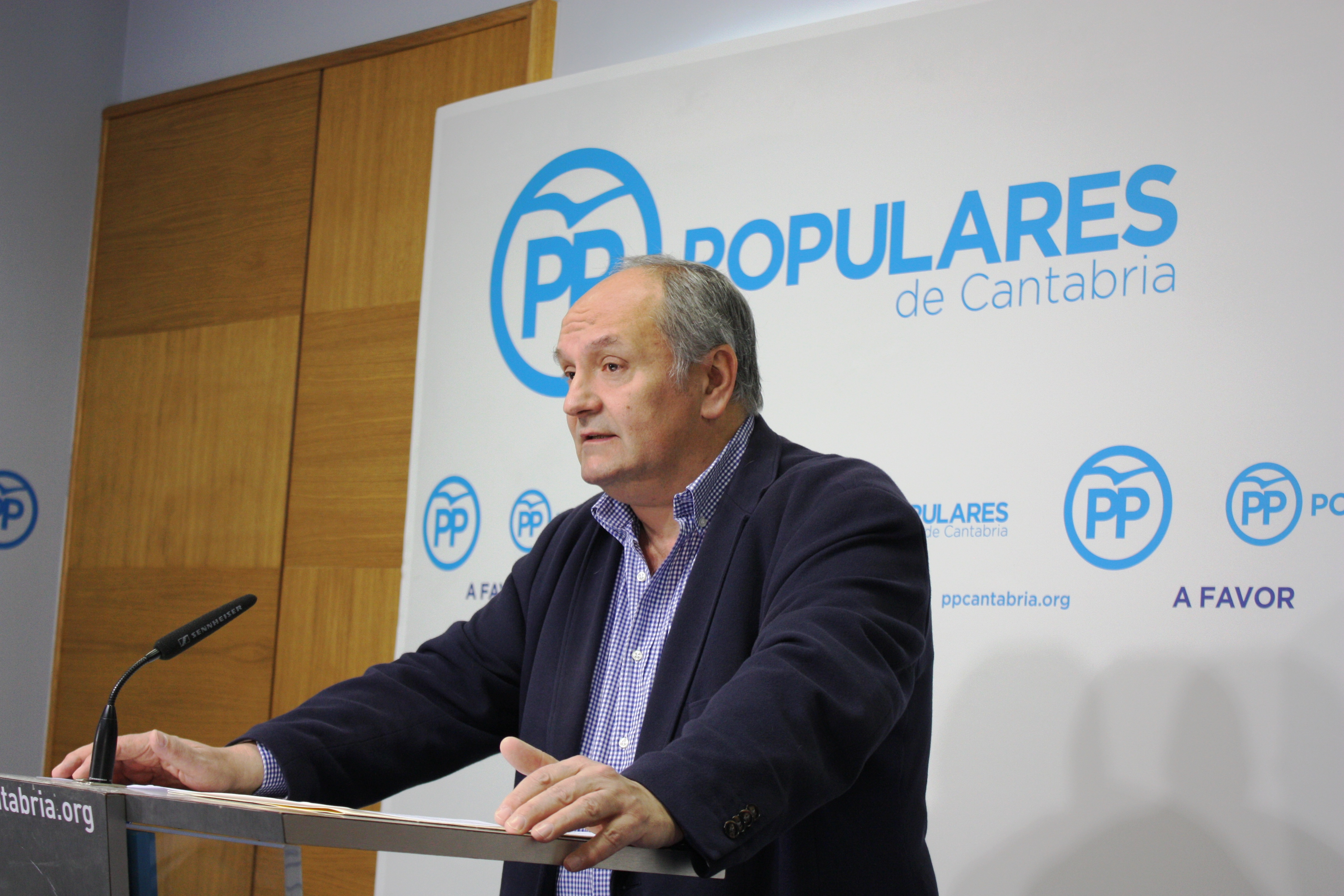 El senador, Javier Fernández, ofreció una rueda de prensa el 10/03/2017